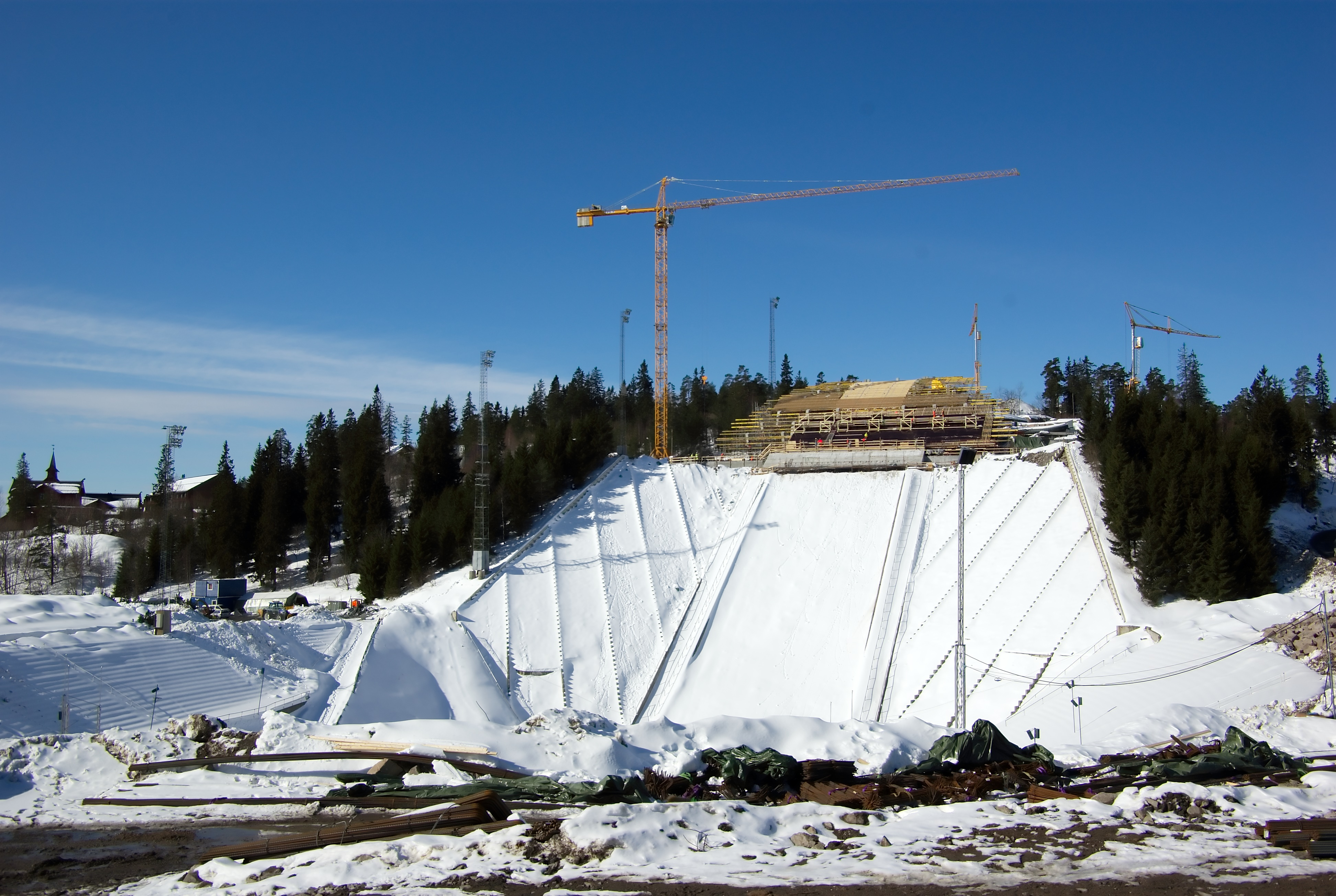 New Holmenkollen in progress